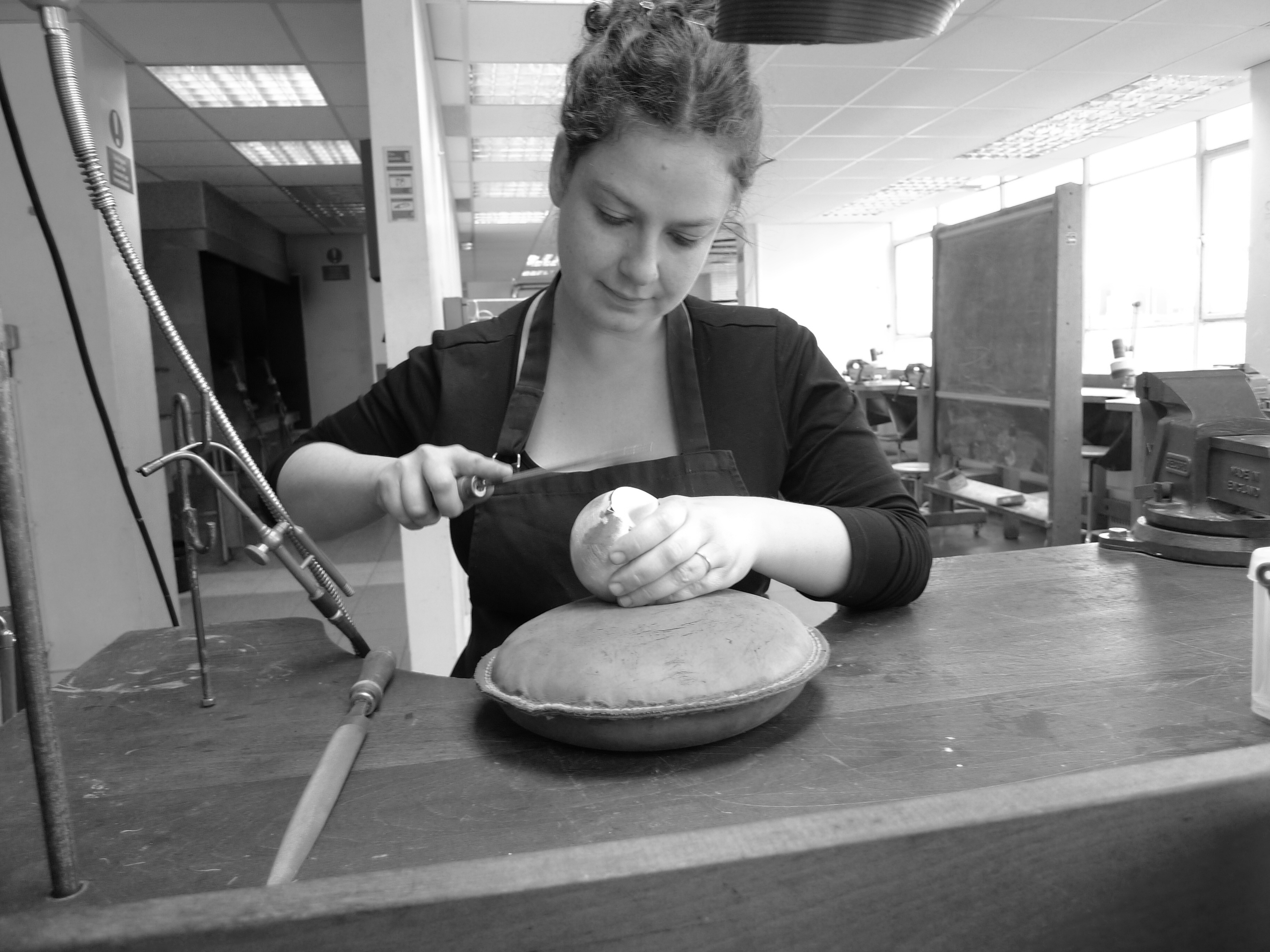 תמונה אישית של עדי טוך